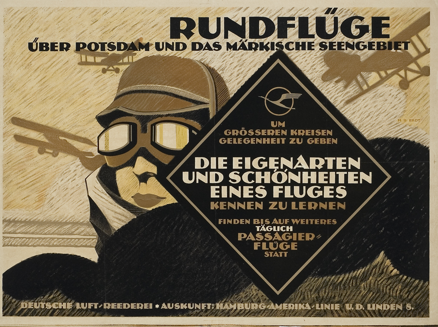 Dieses im Jahr 2015 für Euro 3.500,- angebotene, leicht beschädigte Plakat im Format 70,6 x 94,7 cm der Luft-Reederei wurde 1919 von Hans Rudi Erdt, das Signet "Kranich" stammt aus der Feder von Otto Firle. Auf dem Mehrfarbdruck ist eine junge Frau mit Fliegerbrille zu sehen, im Hintergrund mehrere Doppeldecker-Flugzeuge in der Luft. Das Plakat wirbt für „Rundflüge über Potsdam und das Märkische Seengebiet / Um grösseren Kreisen Gelegenheit zu geben, die Eigenarten und die Schönheiten eines Fluges kennenzulernen, finden bis auf Weiteres täglich Passagierflüge statt“ Auskunft erteilte die Berliner Dependance der Hamburg-Amerika-Linie mit Sitz in der Straße Unter den Linden 8 ...